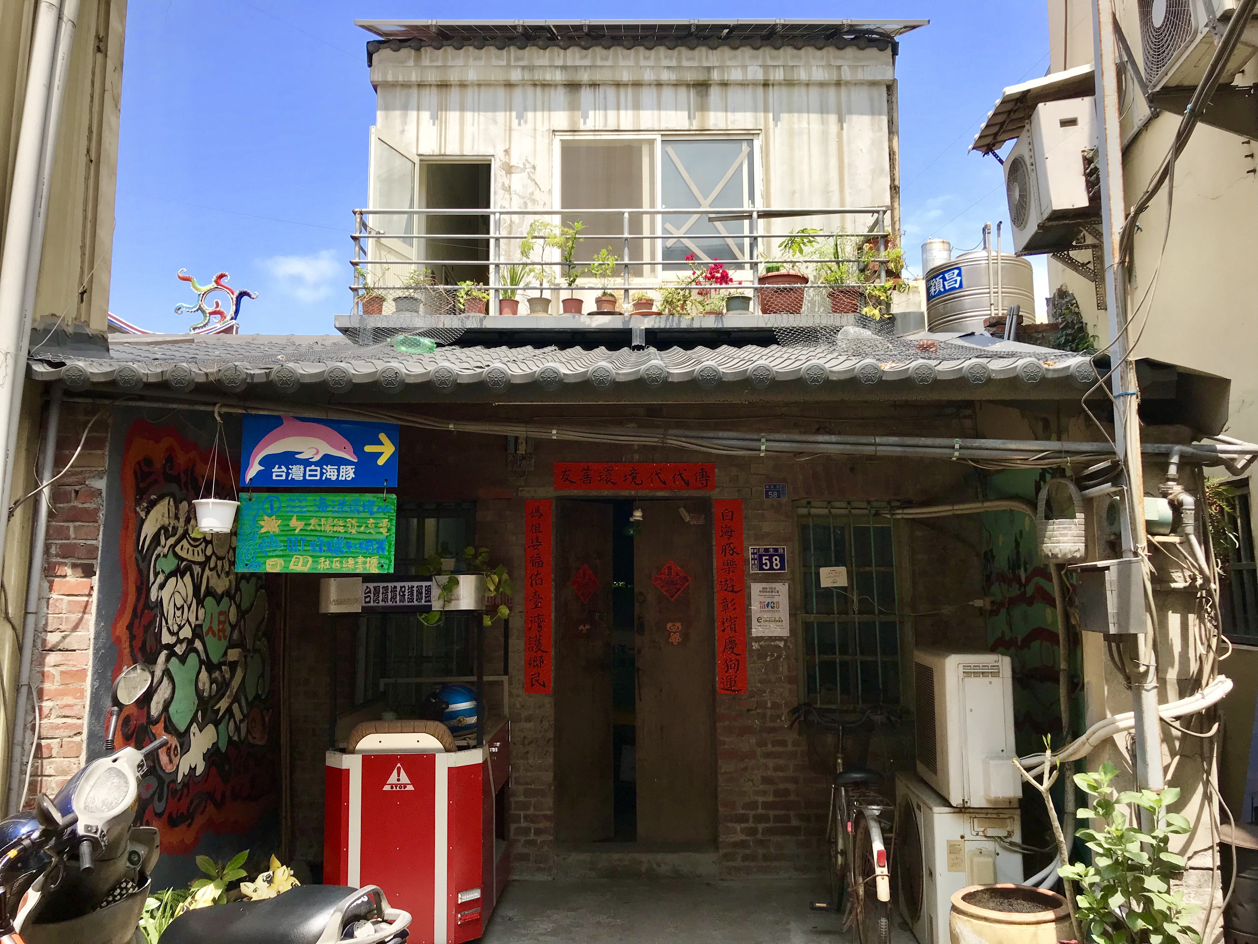 中文（台灣）: 白海豚媽祖宮正面照